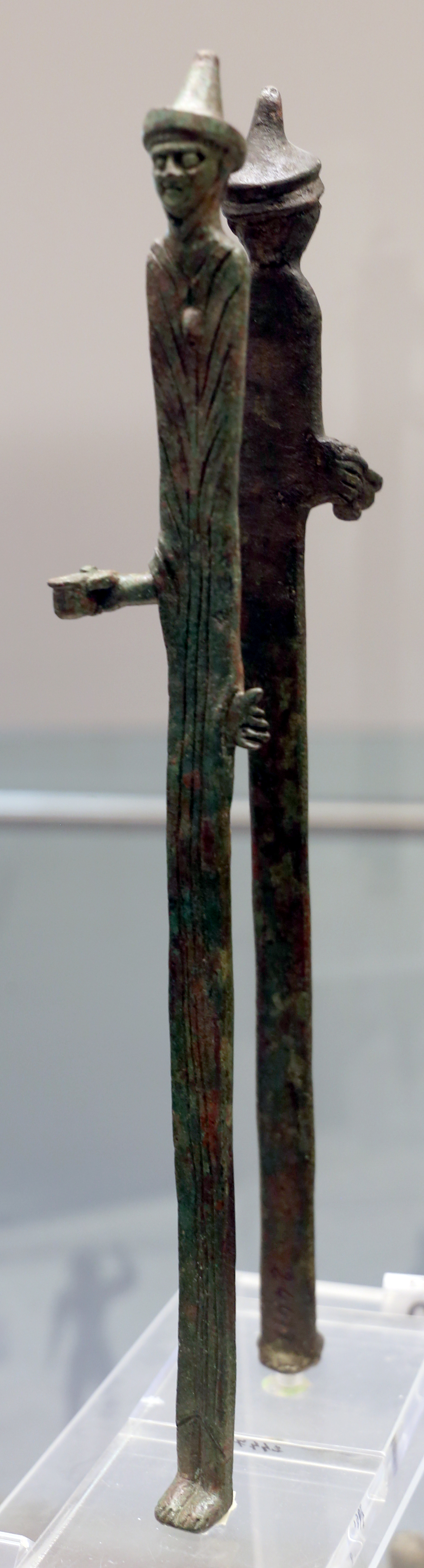 Museo nazionale etrusco di Villa Giulia This is a photo of a monument which is part of cultural heritage of Italy.